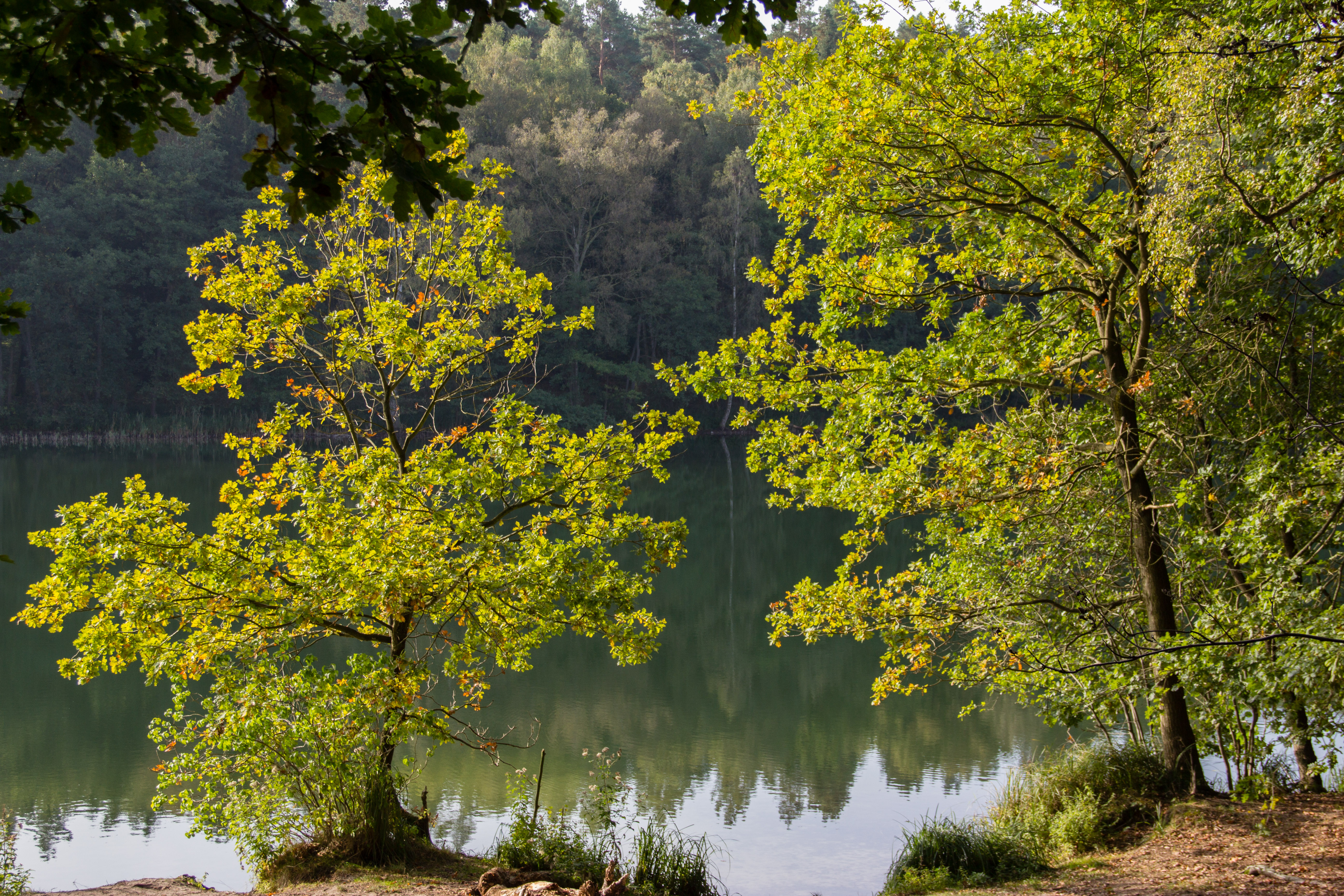 Müritz Nationalpark